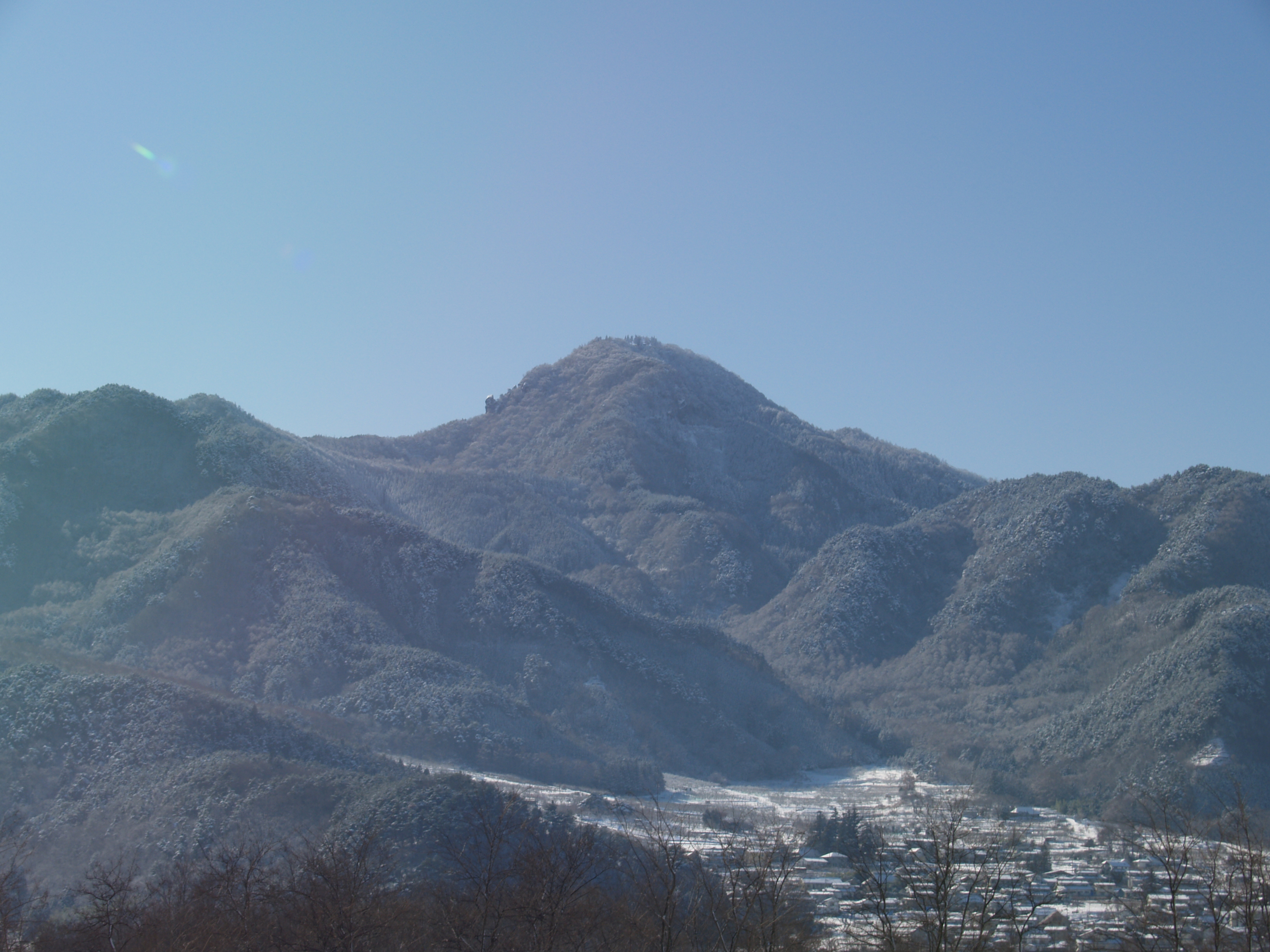 冠着橋より冠着山（姨捨山）を眺望 2012/01/06